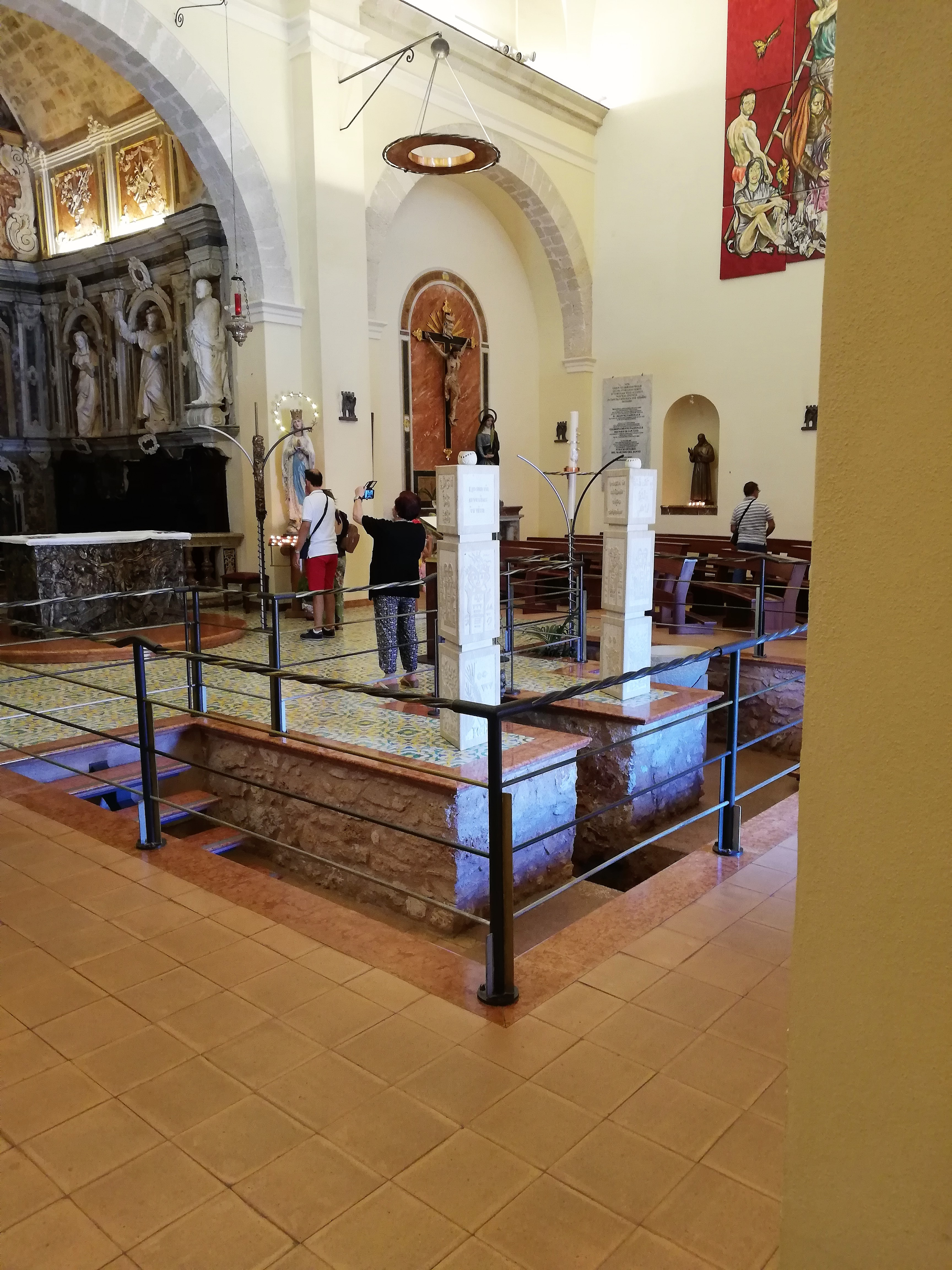 Ingresso ipogeo.